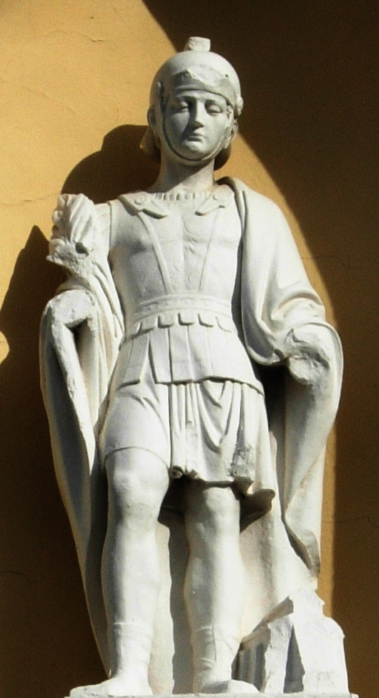 Donatus-Statuette an der Eckfront des denkmalgeschützten Klostergebäudes Maria Hilf zwischen Secunda- und Königstraße in Bornheim. Donatus von Münstereifel (Gedenktag: 30. Juni), einer von vielen Heiligen des Namens Donatus (lat.: der Geschenkte)[1], ist ein Wetterpatron und der Ortspatron Bornheims. Die Legende beschreibt ihn als einen römischen Feldherrn des 2. Jahrhunderts, den Befehlshaber der Legio XII Fulminata (Blitz- oder Donner-Legion), der den Märtyrertod gestorben sei. Es gibt in Bornheim eine Donatusstraße (zwischen Pohlhausen- und Kallenbergstraße) und eine Donatus-Apotheke. Im Park des Bornheimer Schlosses (am Apostelpfad) stand von 1735 bis 1872 eine Donatuskapelle. Ihre Glocke hängt heute in der Servatiuskirche. Die Inschrift lautet: Donate, a voce fulminum defende nos grandinum, übersetzt: Donatus, behüte uns vor dem Schall der Gewitter und Hagelstürme[2]. ↑ wird gelegentlich verwechselt mit Donatus von Arezzo, Gedenktag: 7. August ↑ im Sinne auch von: der Schall deiner Glocke möge den der Gewitter und Hagelstürme übertönen; fulminum und grandinum sind Genitiv Plural von fulmen (Blitz, Donner) bzw. grando (Hagel, Hagelsturm)